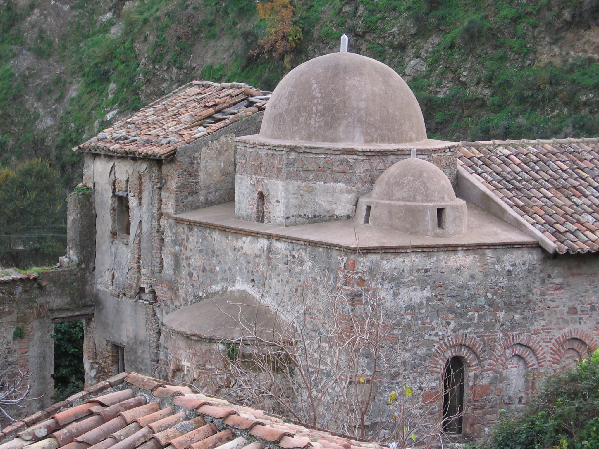 Veduta della Chiesa Normanna Santa Maria di Mili